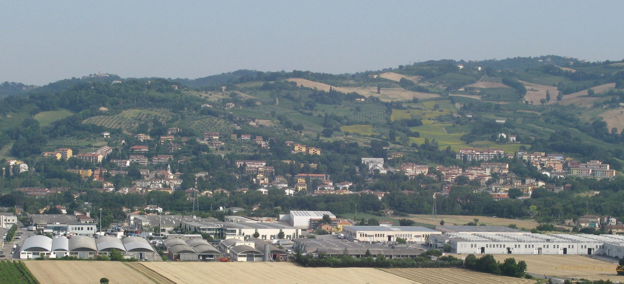 Panorama di Montelabbate.